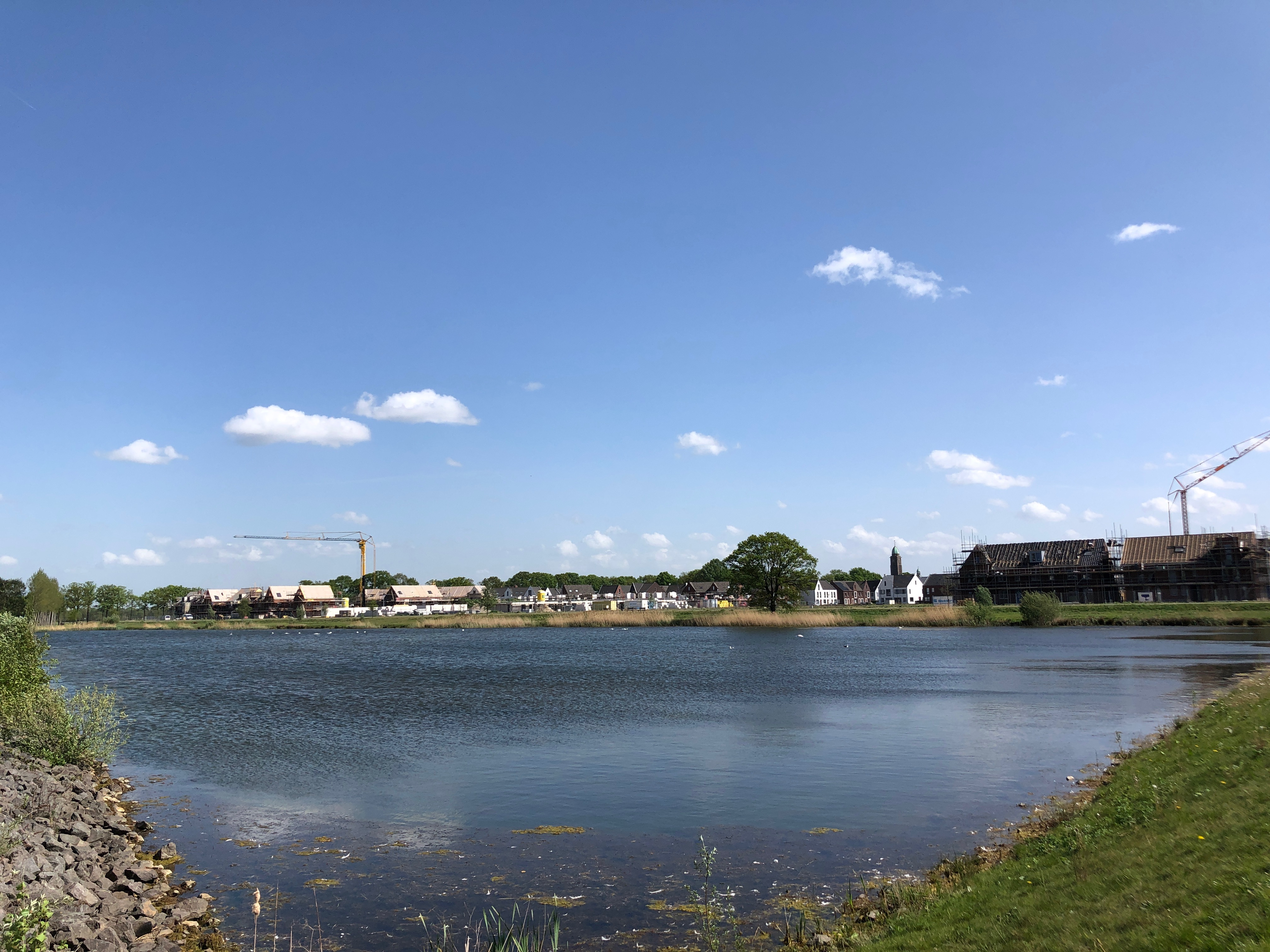 Zicht op een deel van de wijk Bouverijen in aanbouw in Teteringen